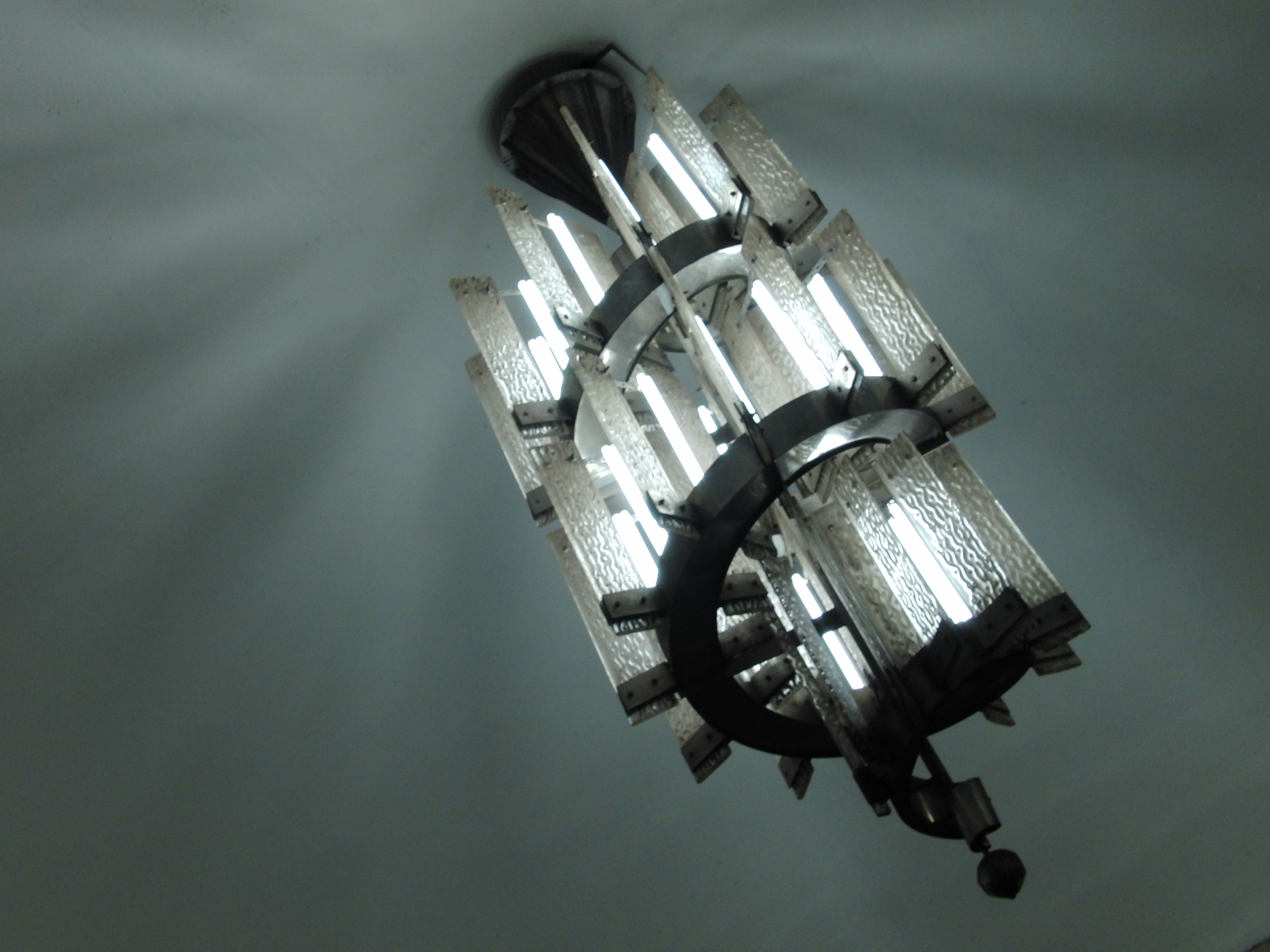 Marksistskaya (Марксистская)